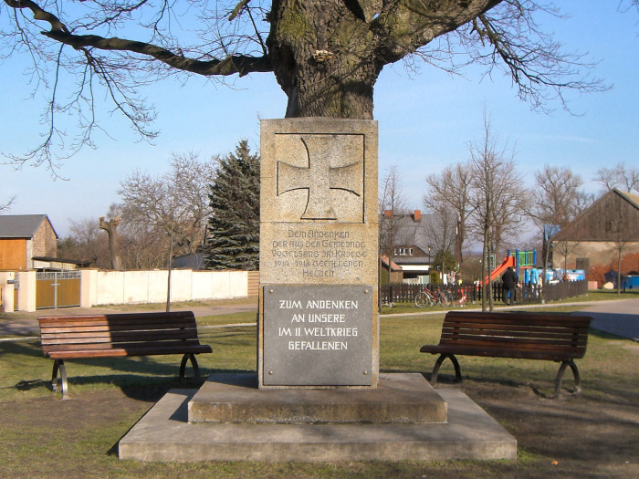 Denkmal zu Ehren der Gefallenen aus beiden Weltkriegen.